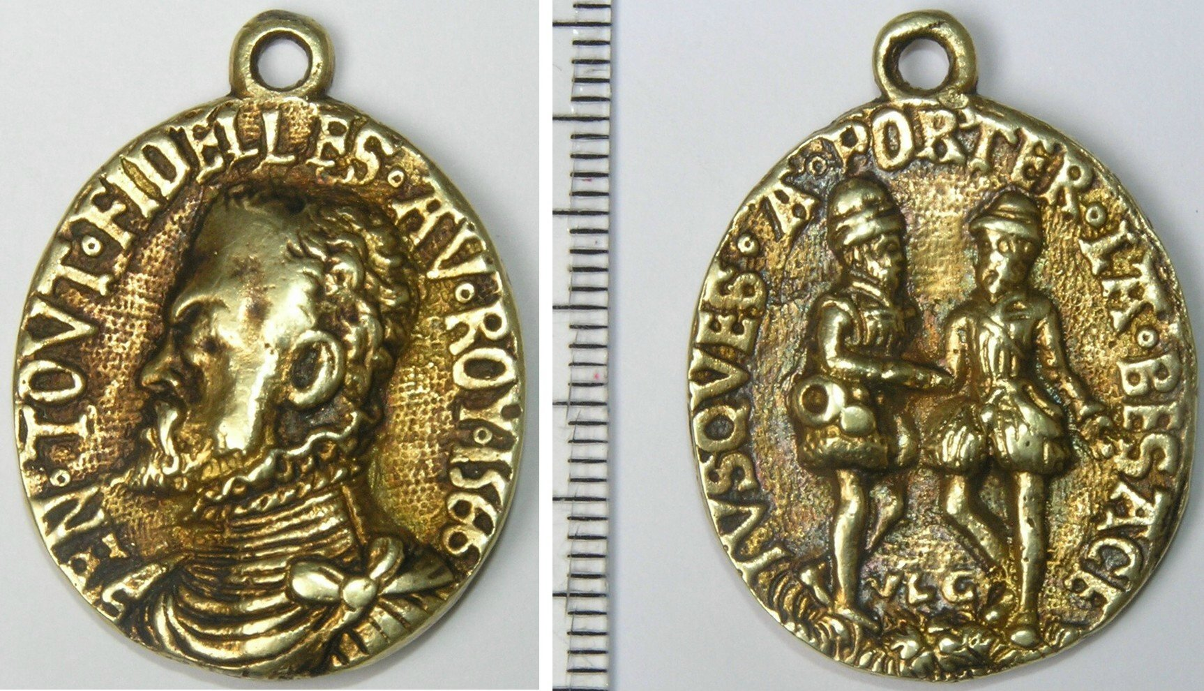 Verguld zilveren geuzenpenning, 1566 Foto van eigen exemplaar